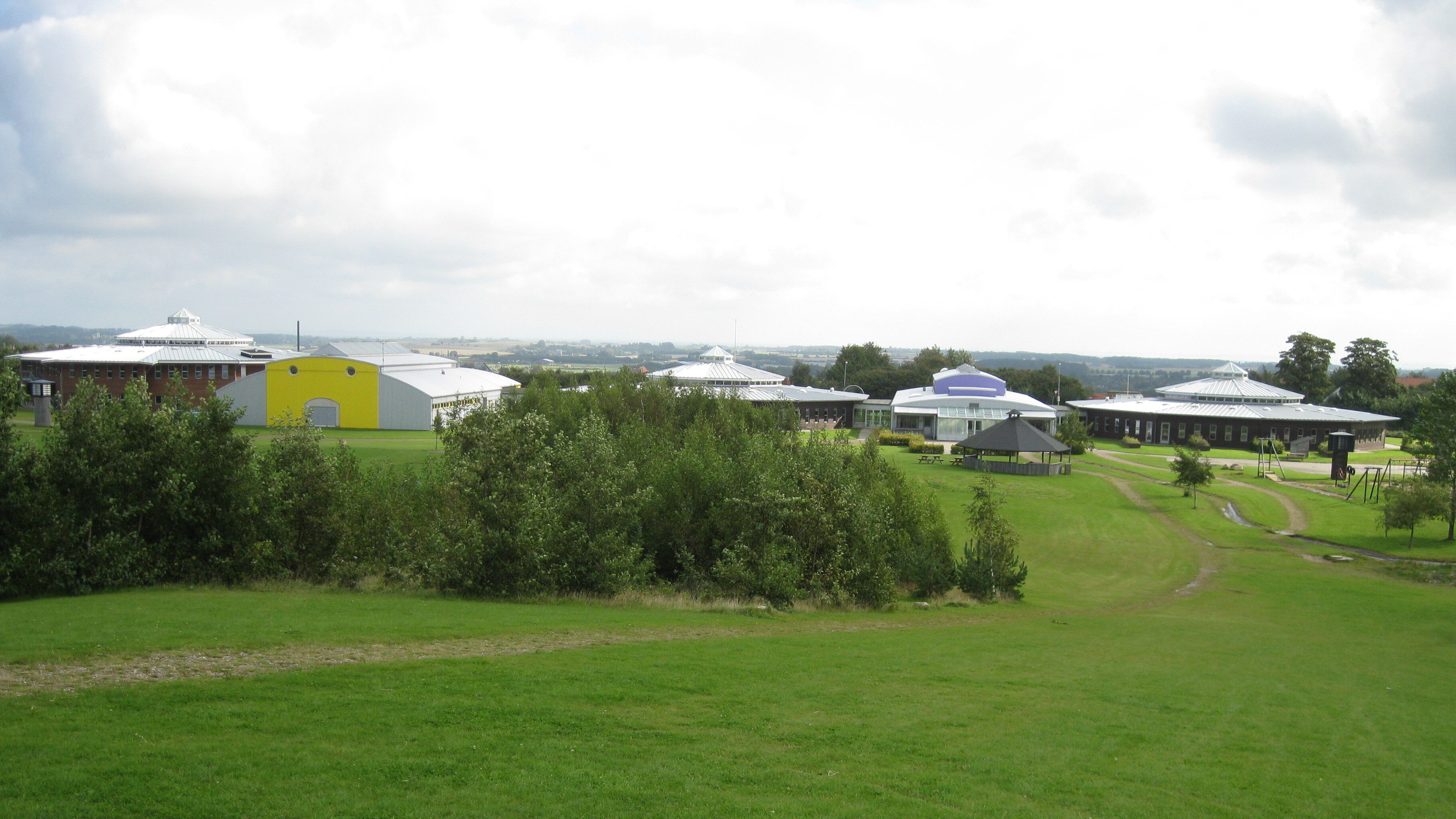 Vestermarkskolen, Odder